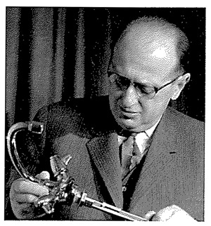 Gustav Schmiedl begutachtet seine Erfindung, die Einlocharmatur.